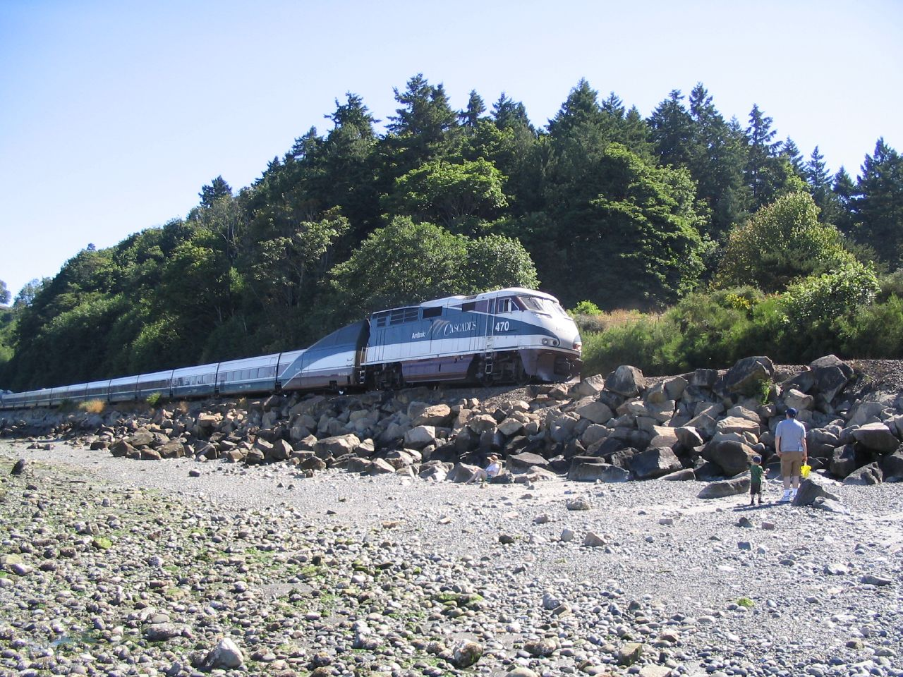 Amtrak Cascades at Carkeek Park